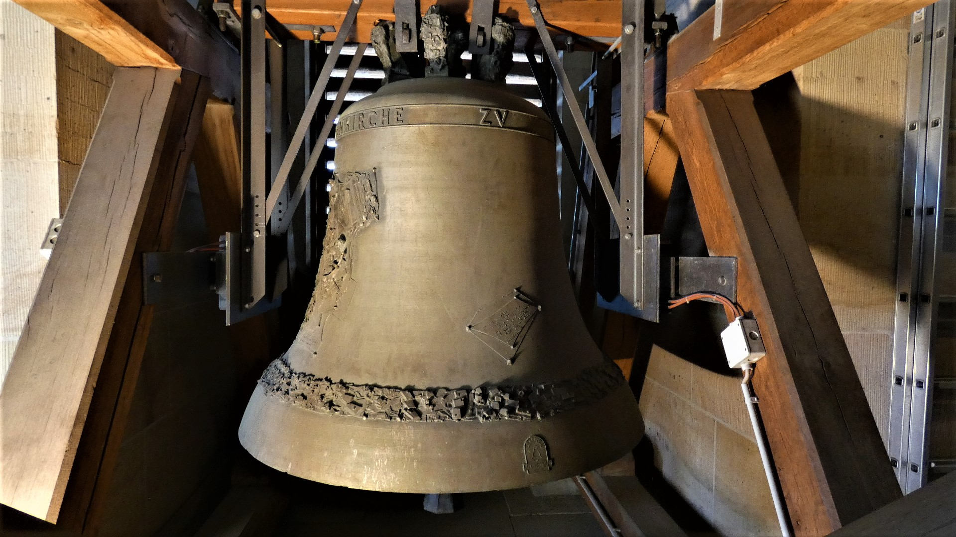 Große Glocke Jesaja im hölzernen Glockenstuhl